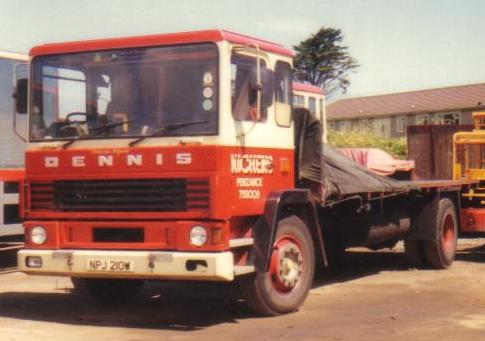 1981 Dennis Delta